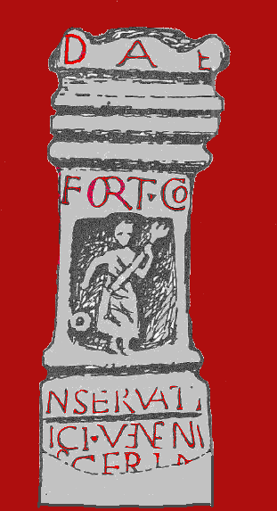 Fortunalatar, gefunden 1884 in der römischen Therme von Chesters/Cilurnum, GB, Zeichnung aus dem 19. Jahrhundert.